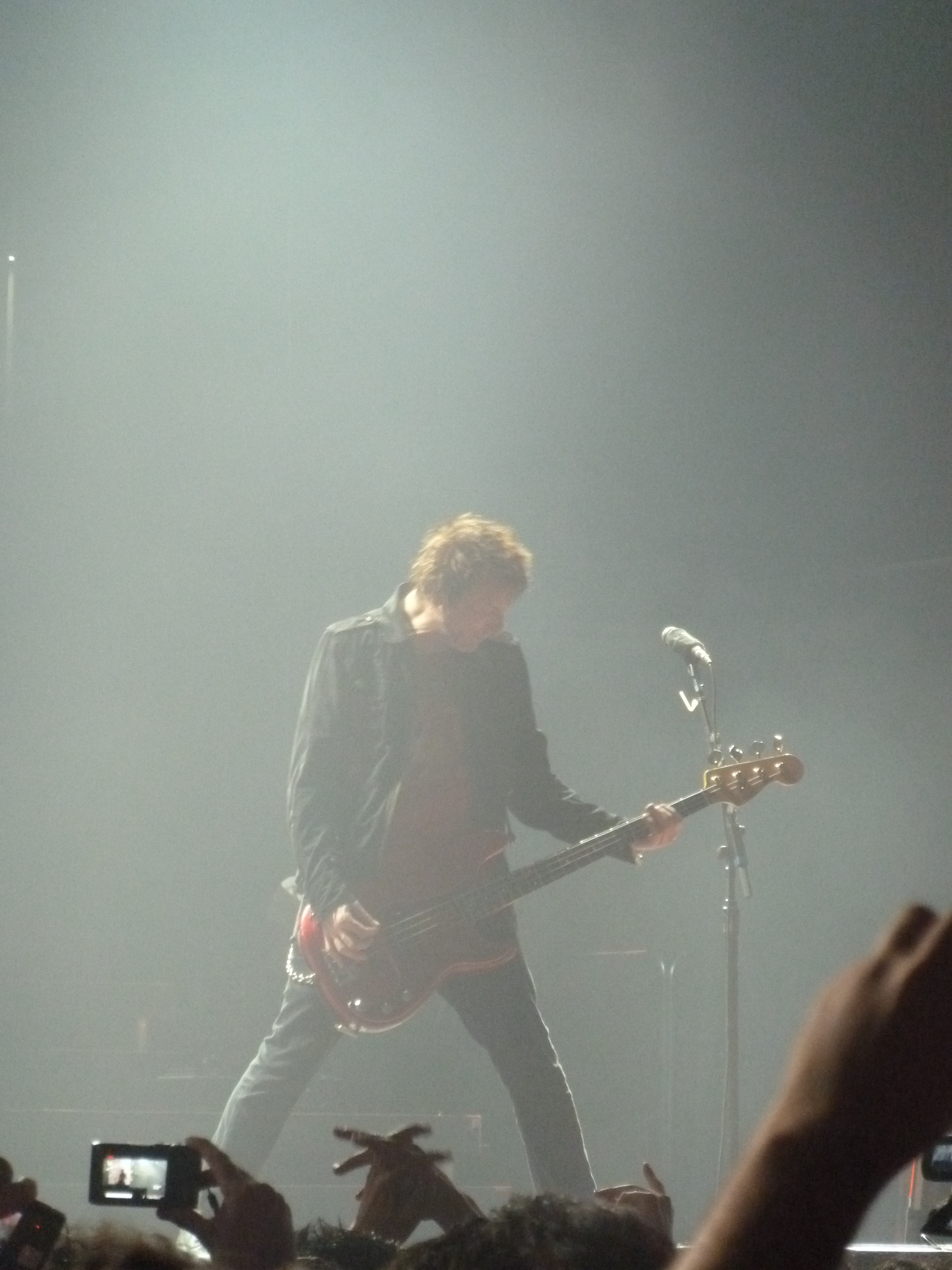 5 octubre, Santiago, Chile. Videos en